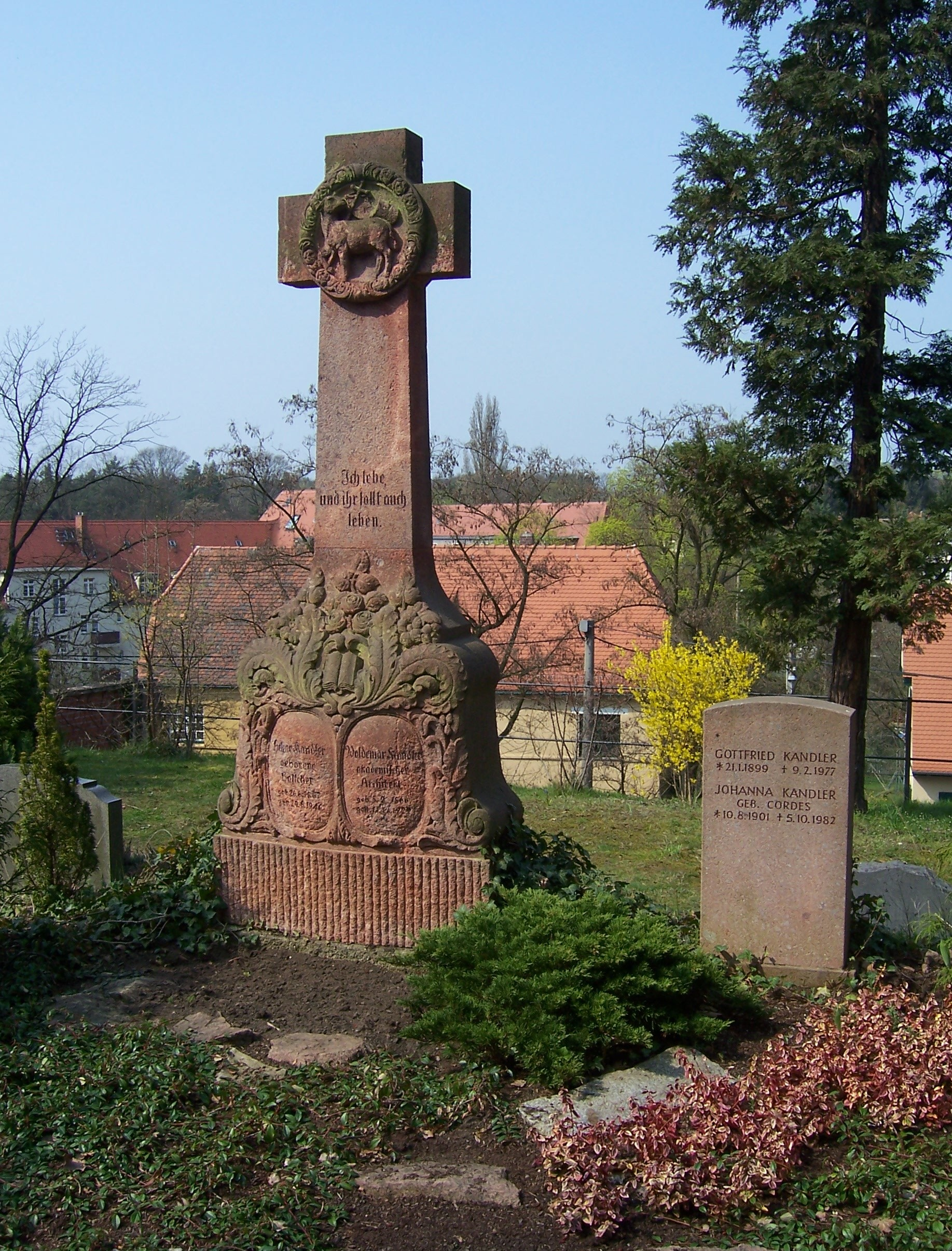 Grab des deutschen Architekten Woldemar Kandler auf dem Alten Friedhof in Dresden-Klotzsche.